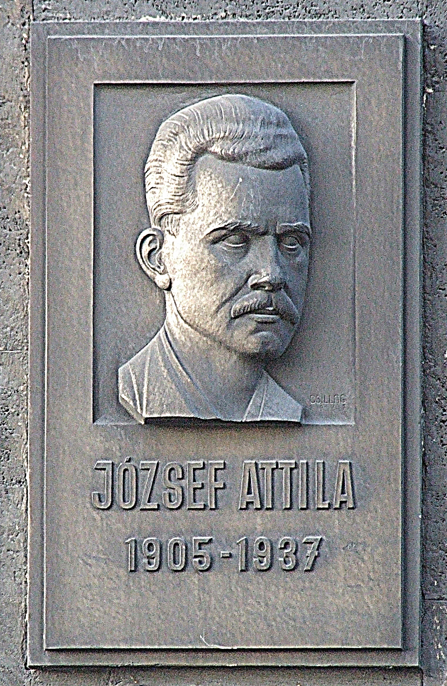 József Attila emléktáblája (Csillag István alkotása)